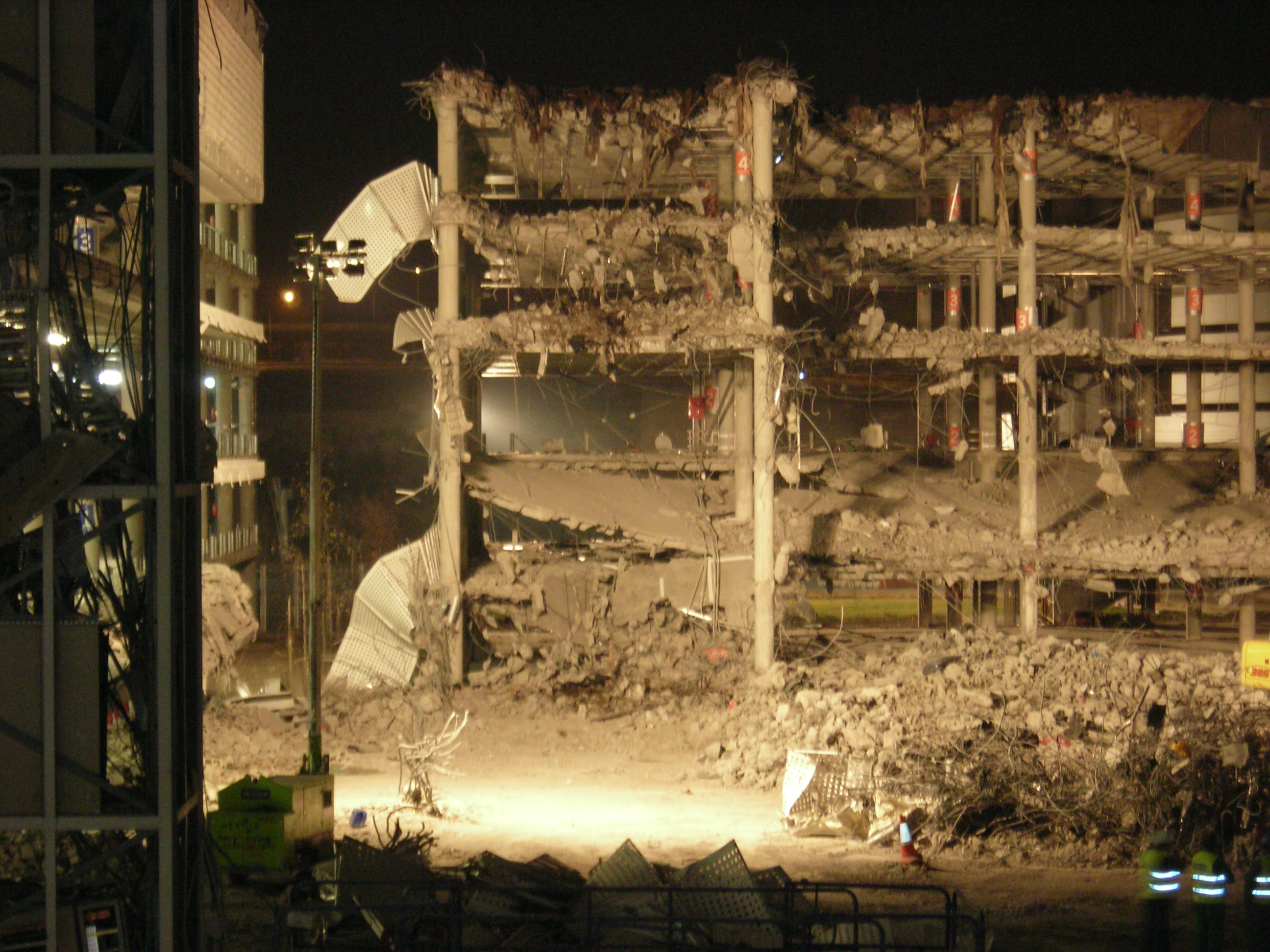 Párking de la T4 (Madrid-Barajas) días después del atentado de ETA del 30 de diciembre de 2006